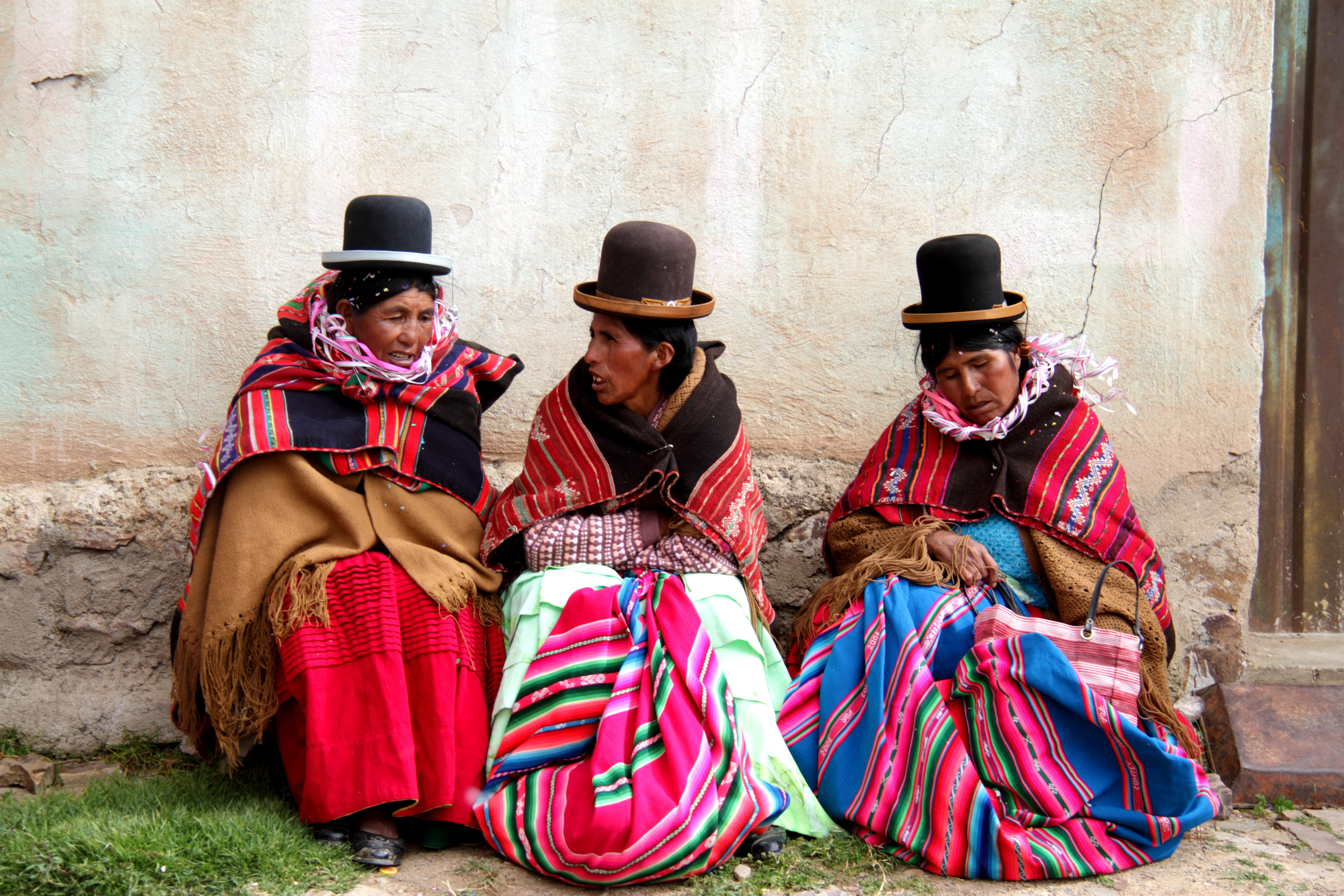 carnaval sur l'altiplano bolivien